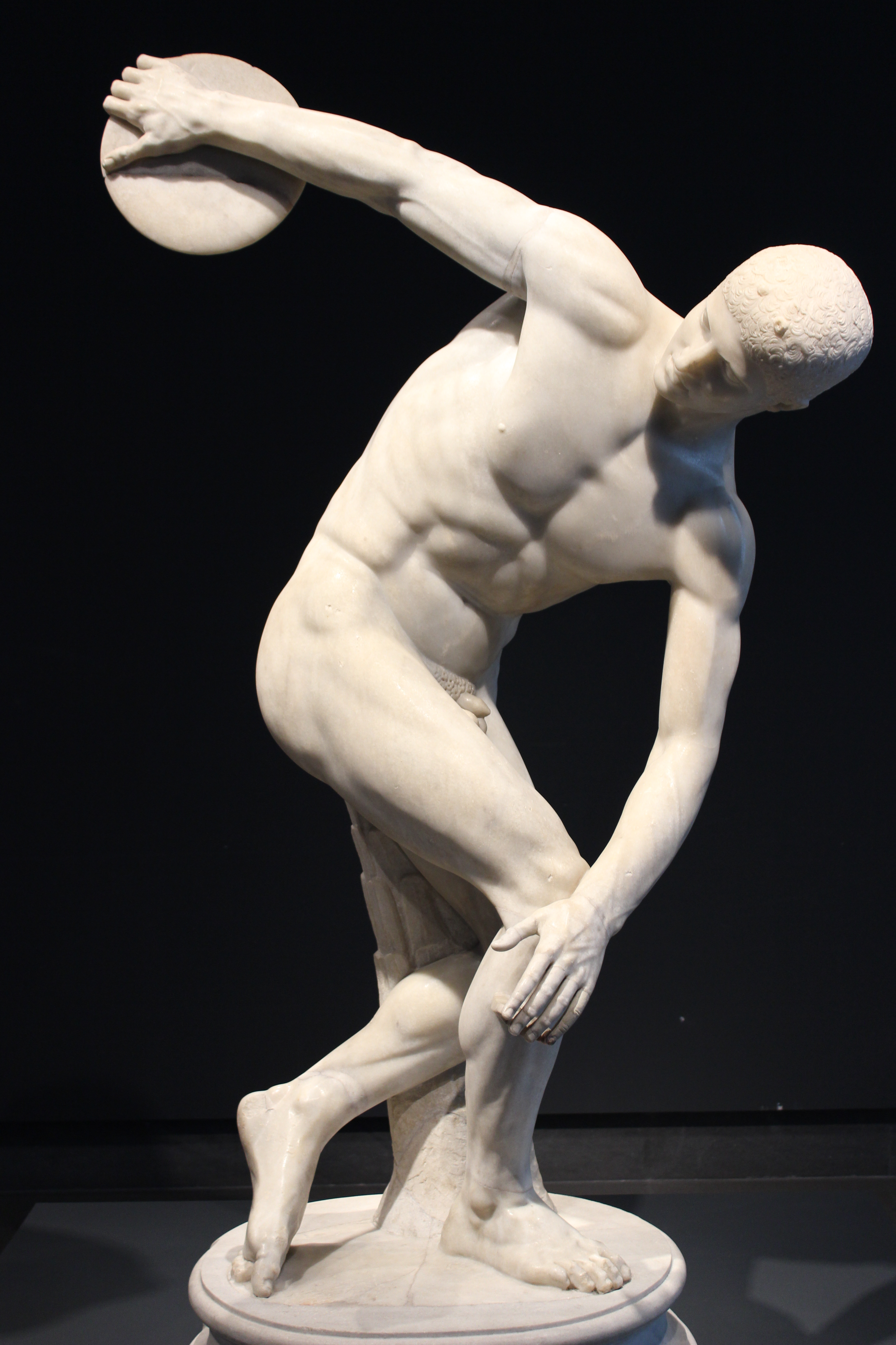 Palazzo Massimo alle Terme. Discóbolo Lancellotti.